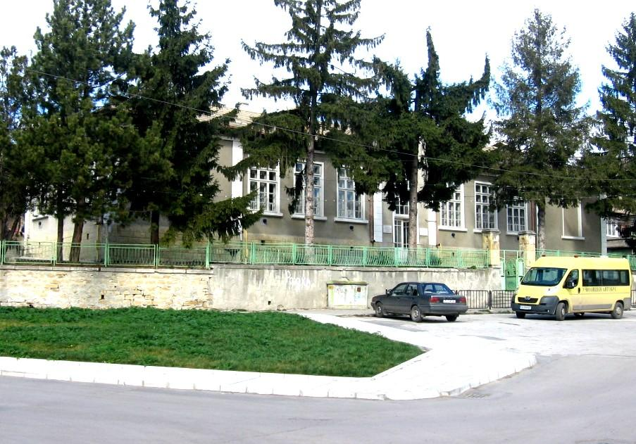 Стара училищна сграда от 1907 год. (На бившето вече Начално училище "Св св. Кирил и Методий"). Фото: Вл. Стойков Building of the former Primary School of Popovo, Bulgaria. Constructed in 1907.